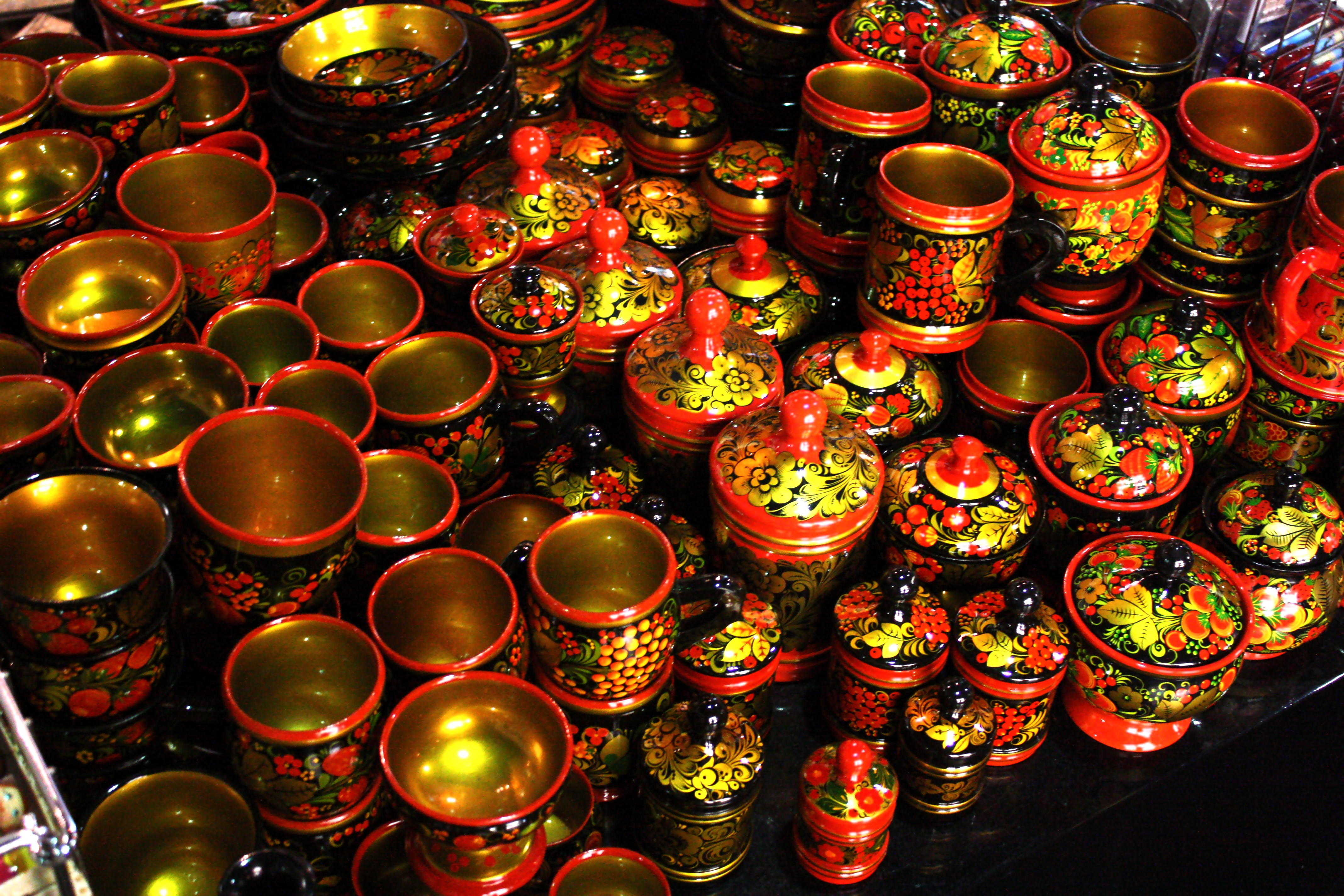 Khokhloma - Chochloma - хохлома, St. Petersburg, 2009, magazin Berjoska, for foreign tourists